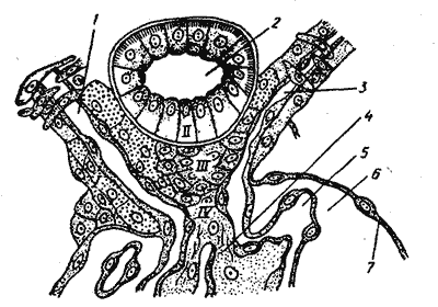 I - гранулированные эпителиоидные (юкстагломерулярные) клетки; II - клетки плотного пятна (macula dense); III - клетки Гормагтига (lads-клетки); IV - мезангиальные клетки; 1 — приносящая клубочковая артериола; 2 - каналец дистального отдела; 3 -выносящая клубочковая артериола; 4 - мезангий; 5 - капилляры клубочка; в - полость капсулы; 7 - наружный листок капсулы